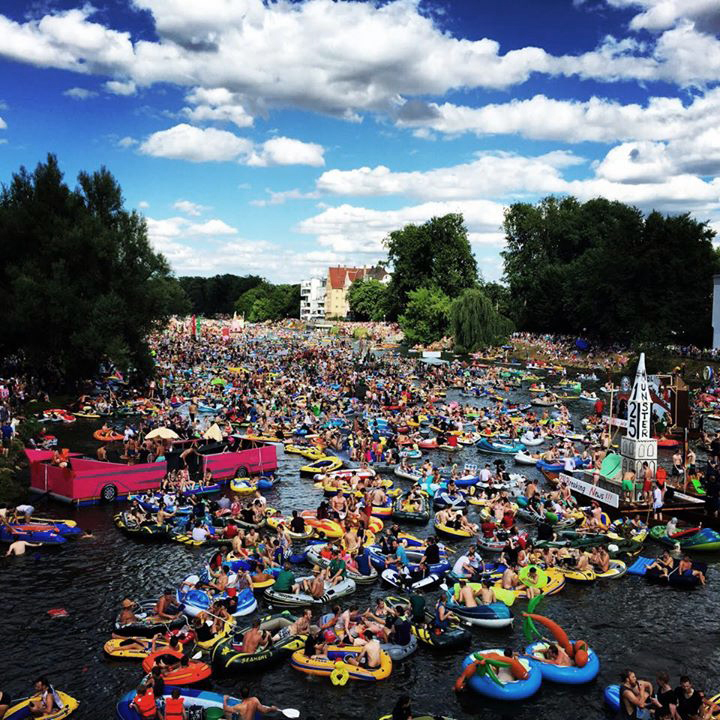 Wasserfestzug Nabada